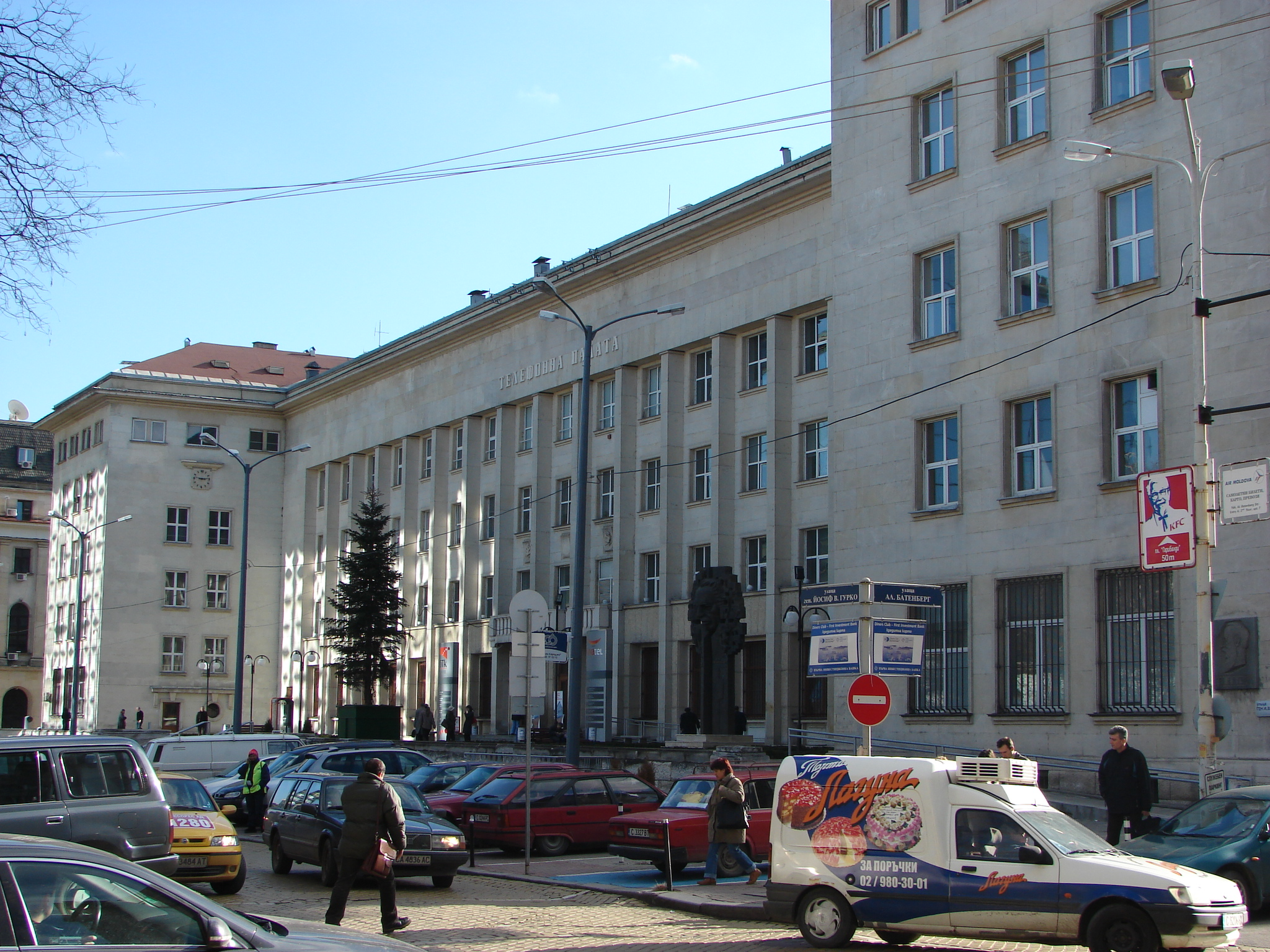 Телефонната палата в София